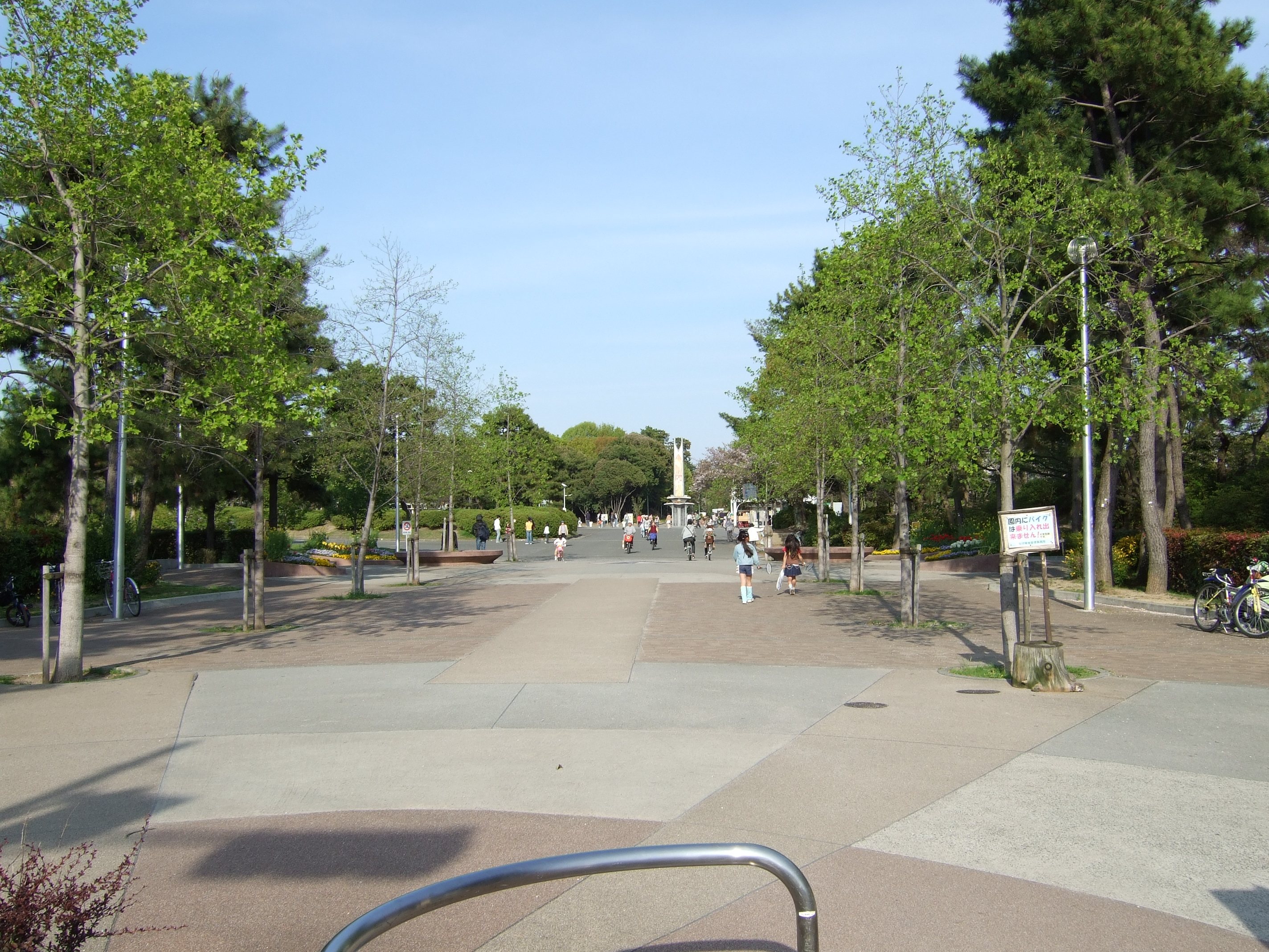 Toyonaka Hattori Ryokuchi